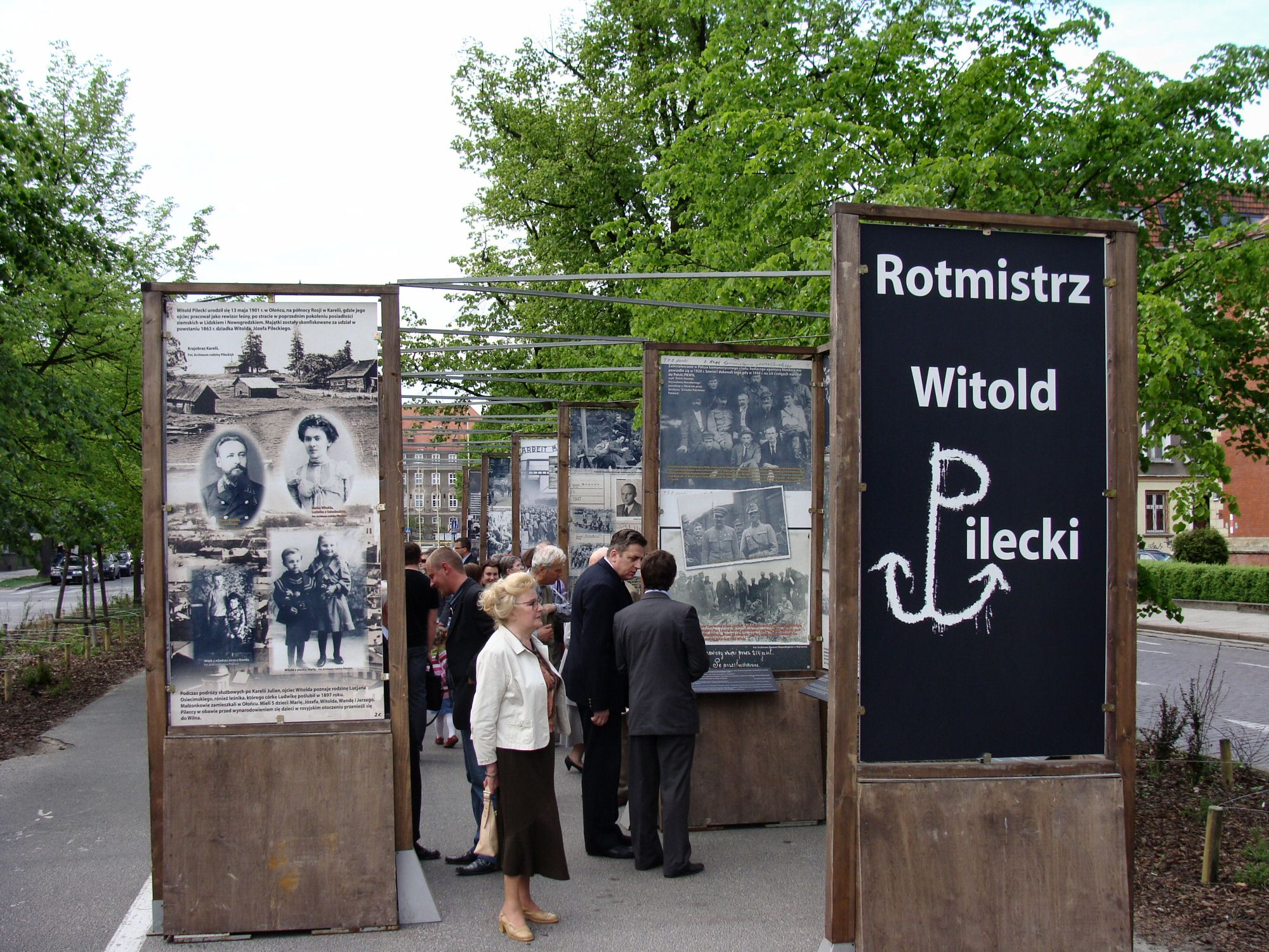 Wystawa plenerowa IPN poświęcona Witoldowi Pileckiemu - kwiecień-czerwiec 2009 Szczecin